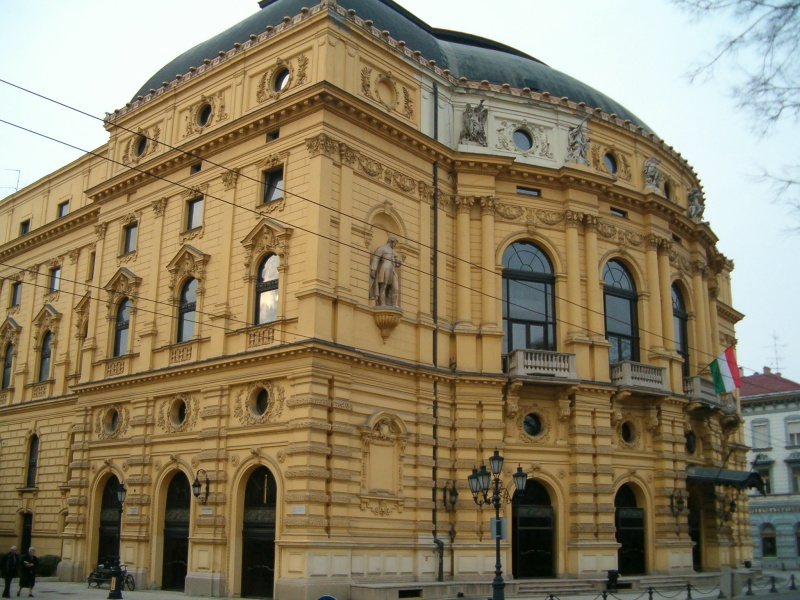 Budova národního divadla v Szegedu, Maďarsko